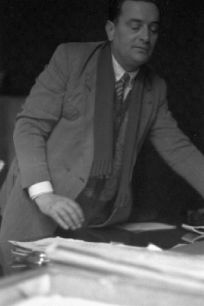 Palermo, Lucio Tasca nel suo studio